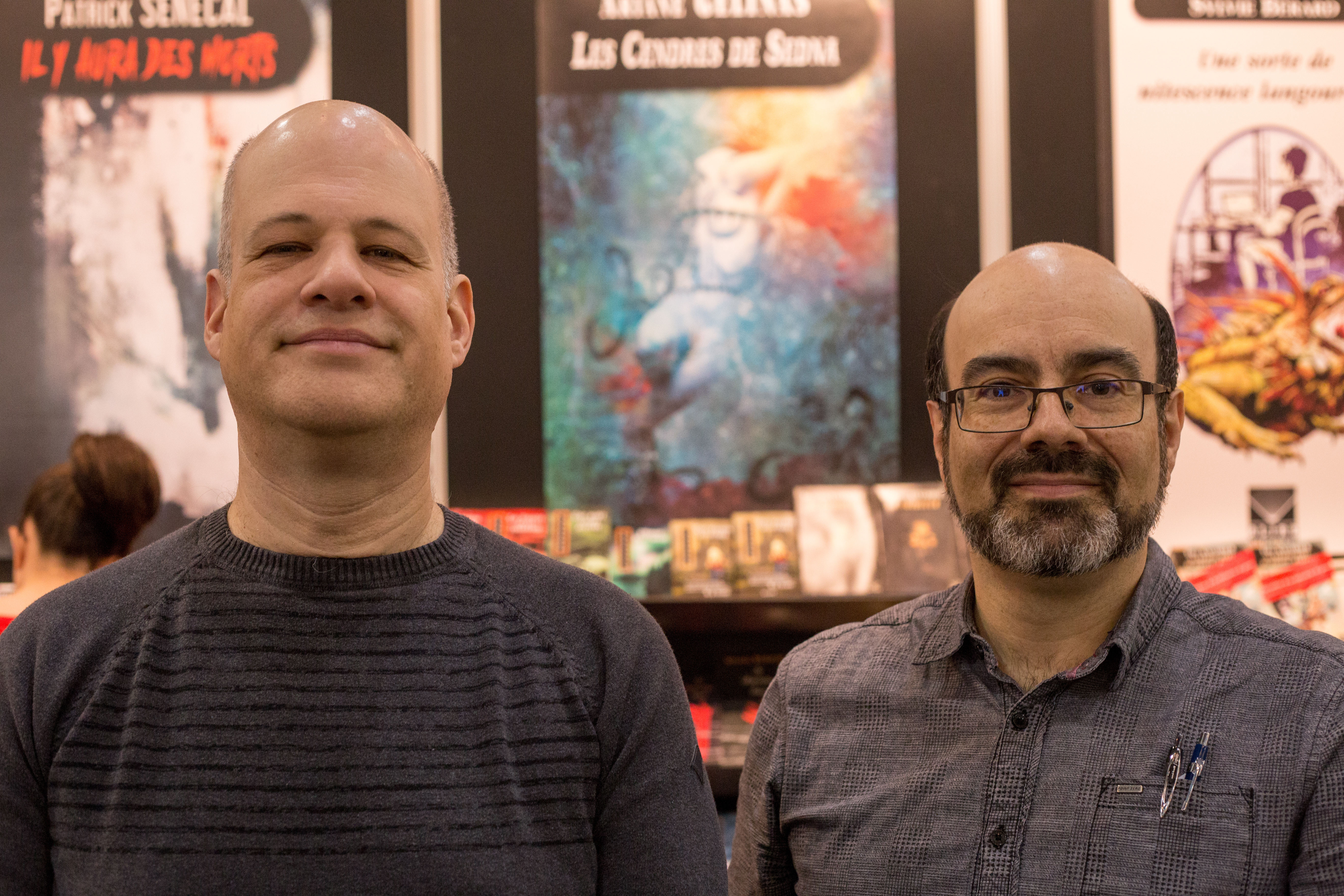 Portrait des auteurs Yves Meynard et Jean-Louis Trudel qui, lorsqu'ils écrivent ensemble, utilisent le pseudonyme Laurent McAllister. Photo prise lors du Salon international du livre de Québec 2018.